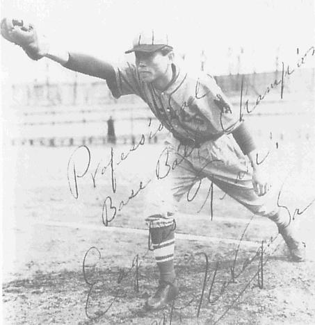 a baseball player from Japan, 中河美芳（Miyoshi Nakagawa）